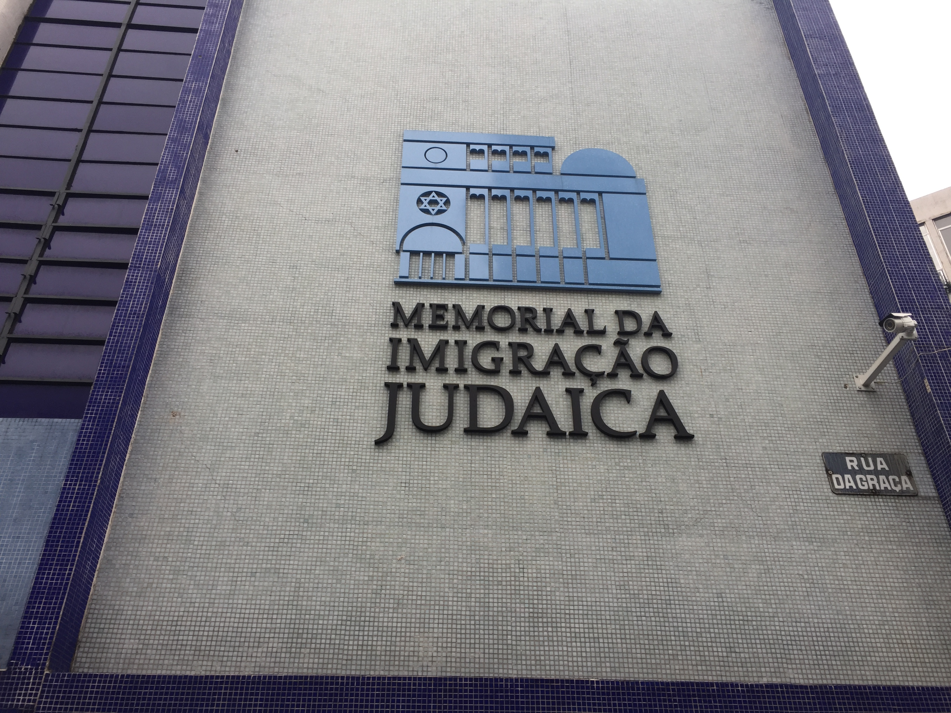 Fachada do Memorial da Imigração Judaica